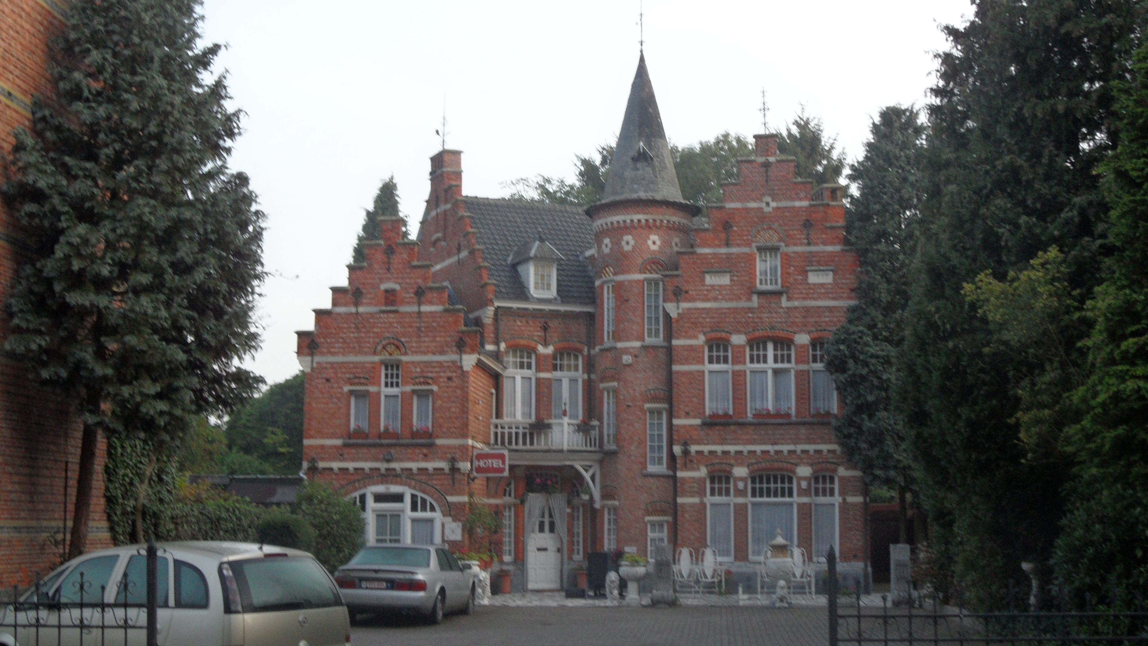 Herenhuis Het Kasteeltje, herenhuis gedateerd anno 1915, in neo-Vlaamse renaissance stijl. Pastoor de Katerstraat 3, Baarle-H